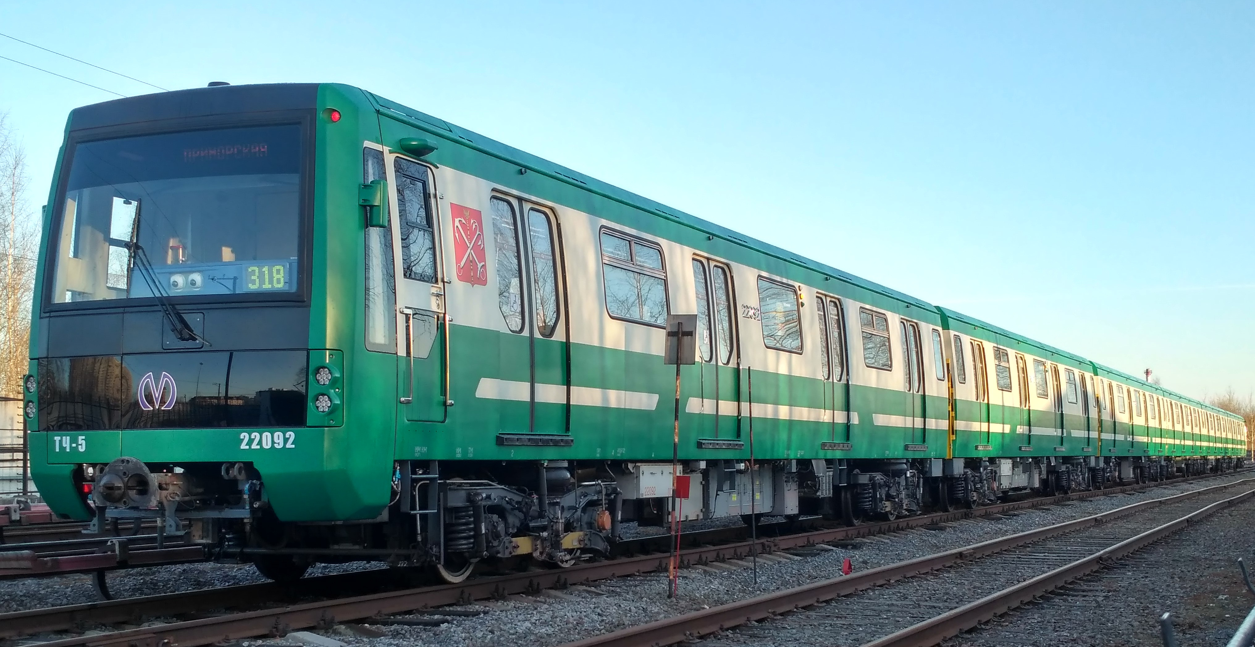 Состав 22091-22092 модели 81-722.3/723.3/724.3 в парке электродепо Невское